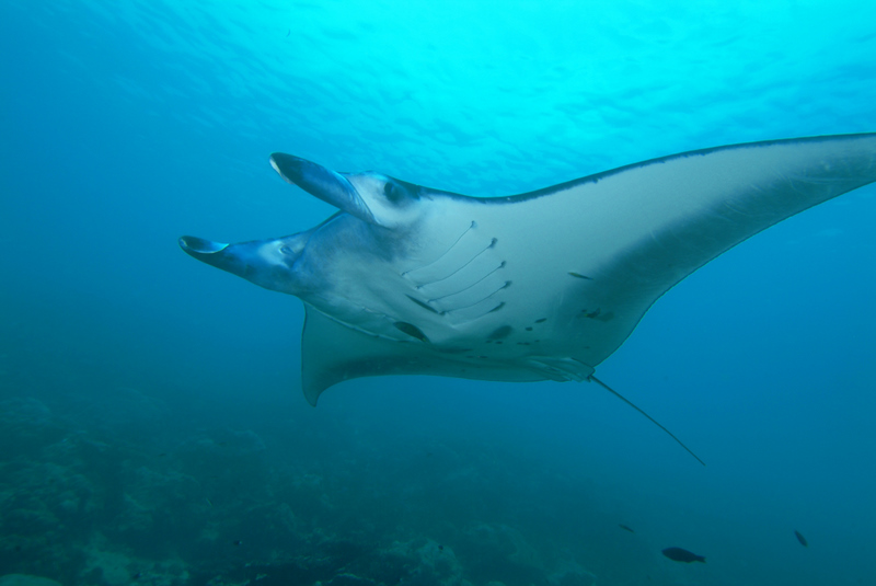 Manta, zdjęciu udostępniono przez Najlepsze Nurkowania, autor Bartosz Cieślak, wykonano 10-2007.